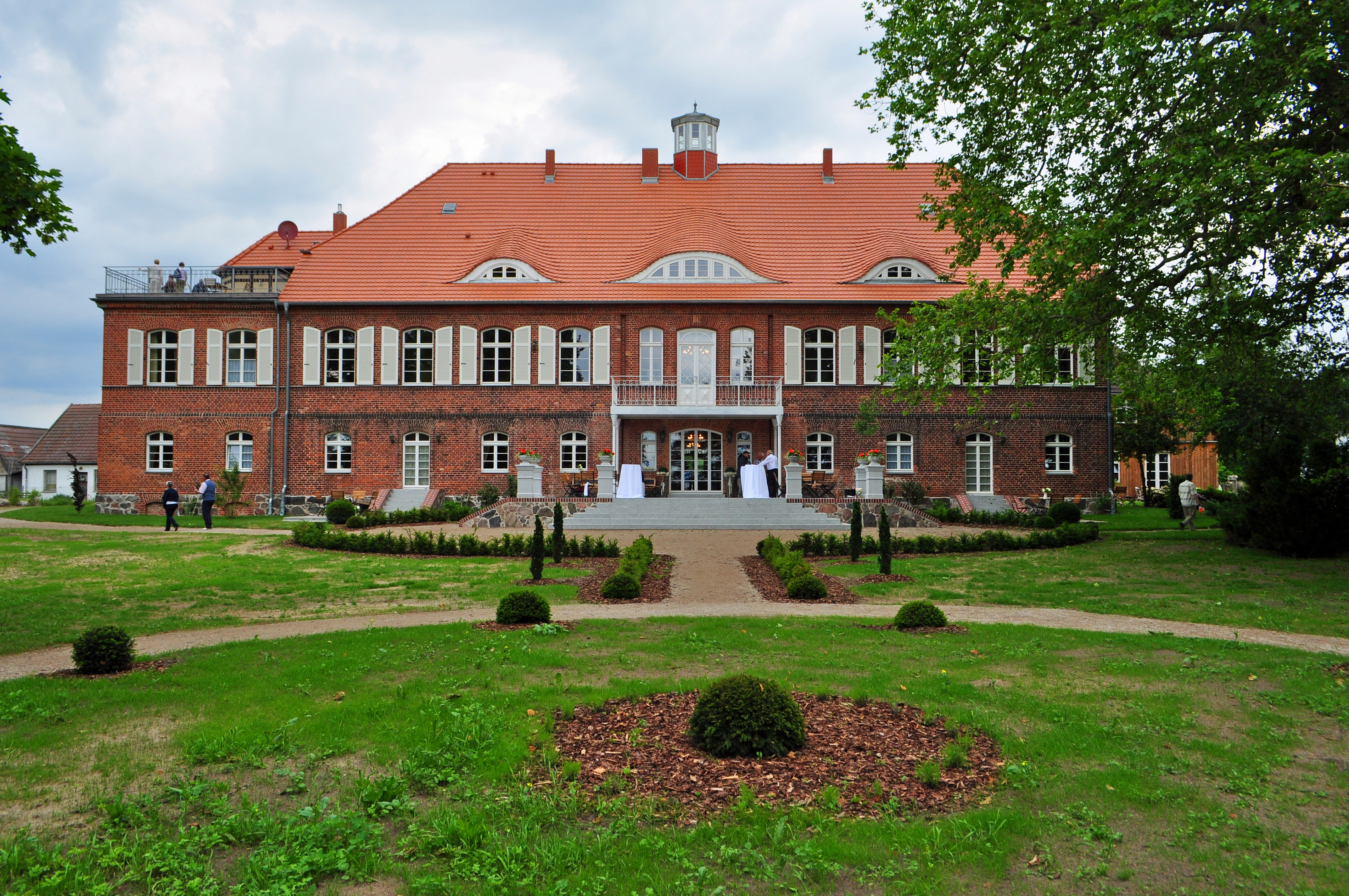 Gutshaus in Pütnitz (Ribnitz-Damgarten) Juni 2013. Hinteransicht. Foto am Tag der feierlichen Wiedereinweihung des restaurierten Gebäudes am 15.6.2013.